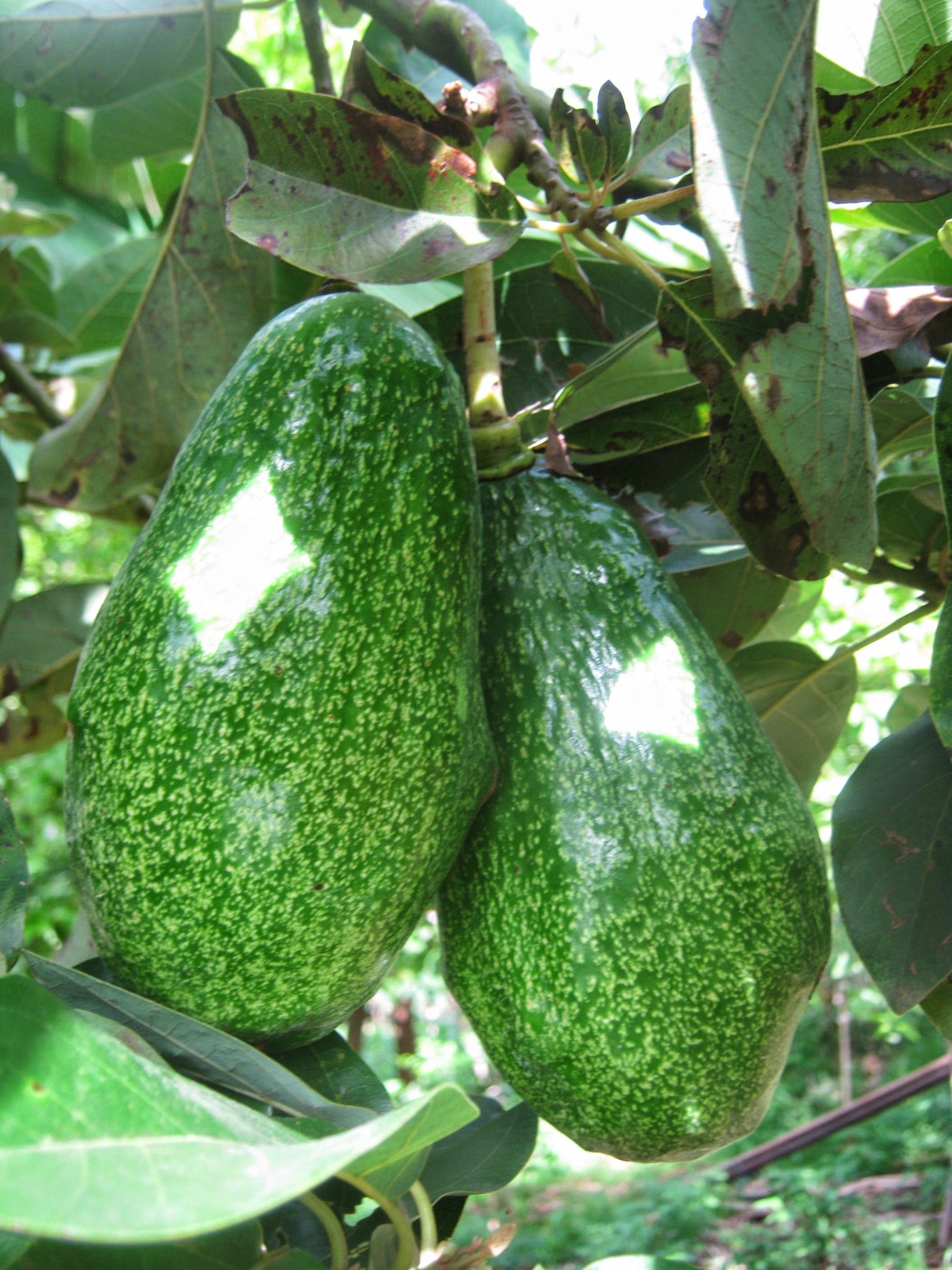 Consommer l'avocat fait baisser le taux de mauvais cholestérol sanguin